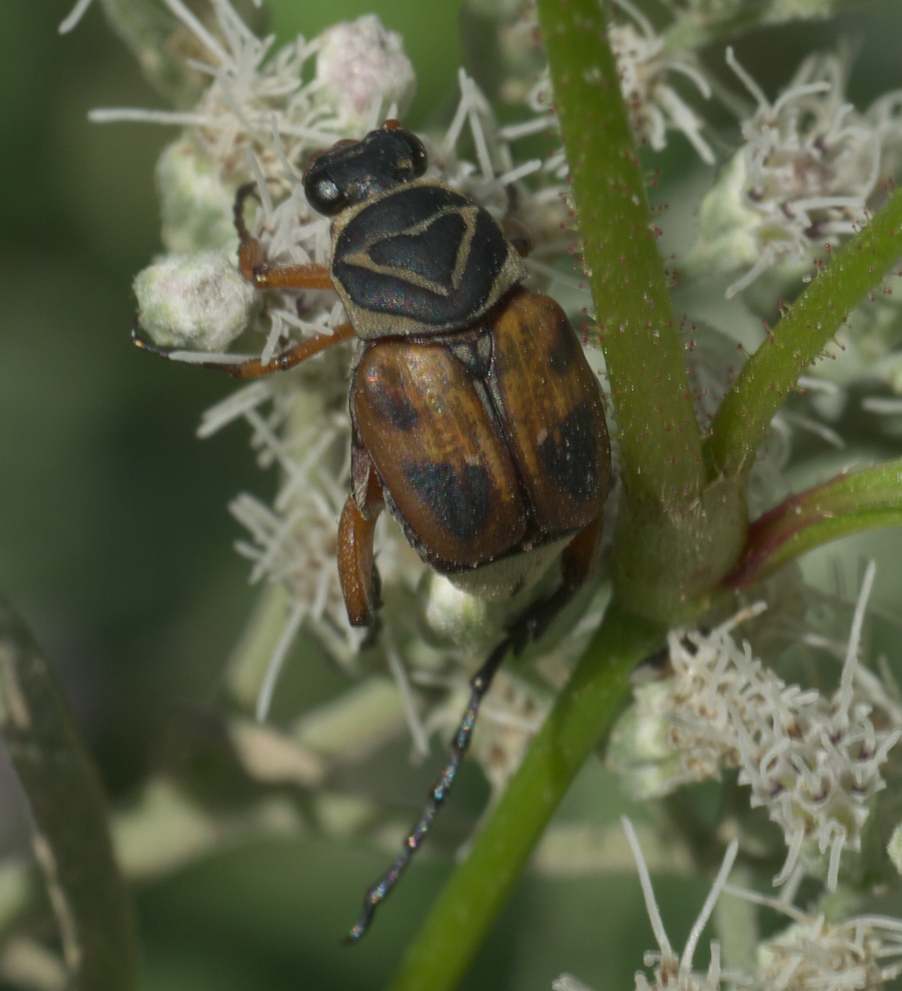 Trigonopeltastes delta, delta flower scarab, ID Confidence: 98